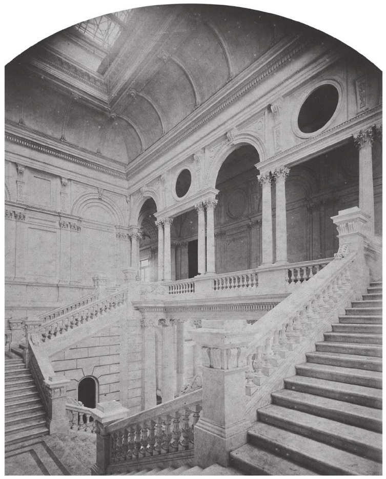 Guilherme Gaensly - Interior do edifício do Museu Paulista - vista a partir da escadaria, c. 1892. Acervo do Museu Paulista.